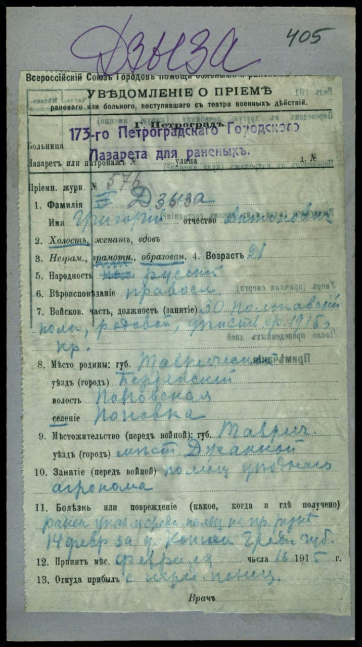 Уведомление о приеме Дзыза Григория Антоновича в 173-и городской лазарет для раненных города Петроград